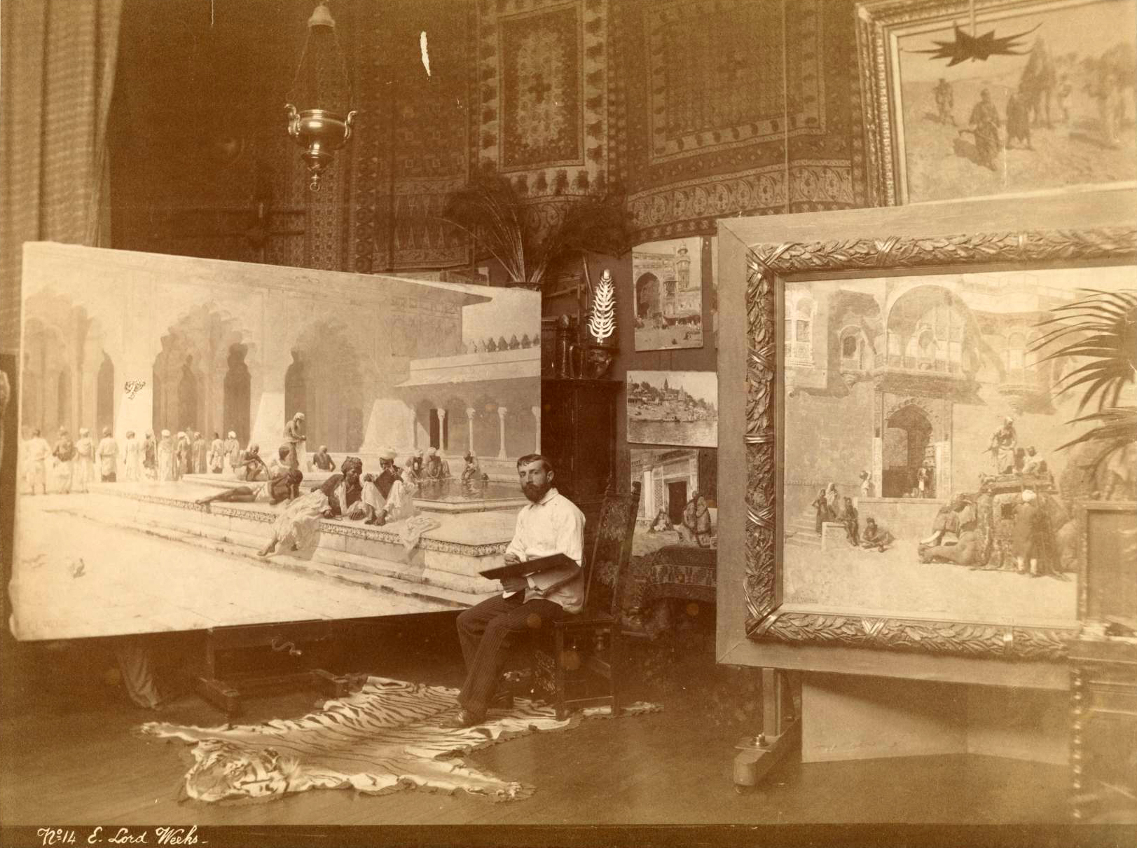 Edwin Lord Weeks in his Paris studio